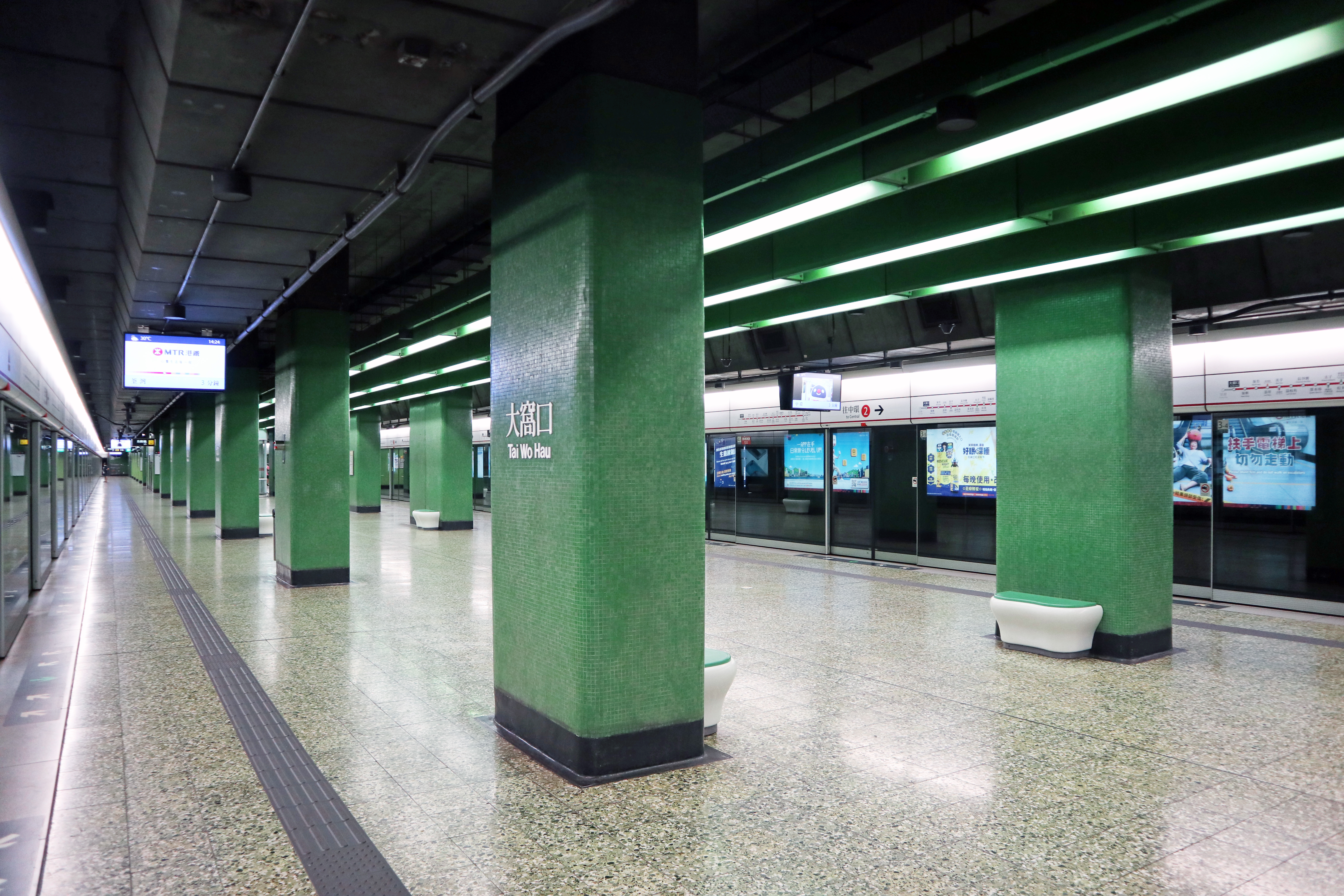 港鐵大窩口站月台